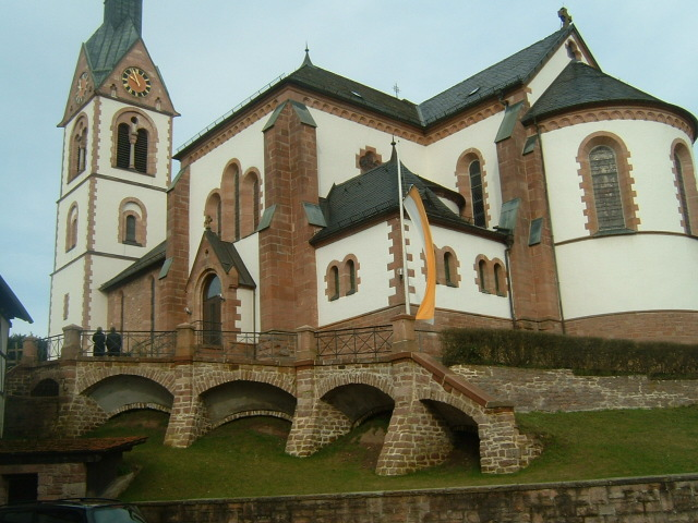 Oberndorf Jossgrund Germany Martinskirche